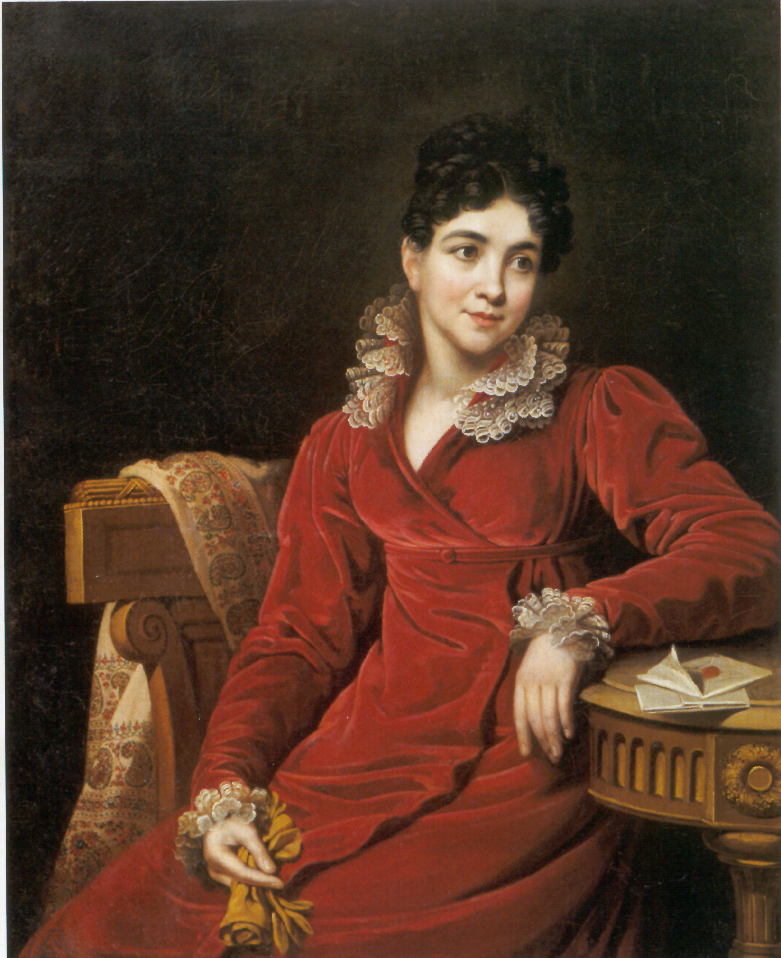 Графиня Прасковья Петровна Кутайсова, ур. Лопухина (1784—1870)- фрейлина, жена сенатора, графа Павла Ивановича Кутайсова (25.11.1780—9.03.1840)— сына фаворита Павла I.